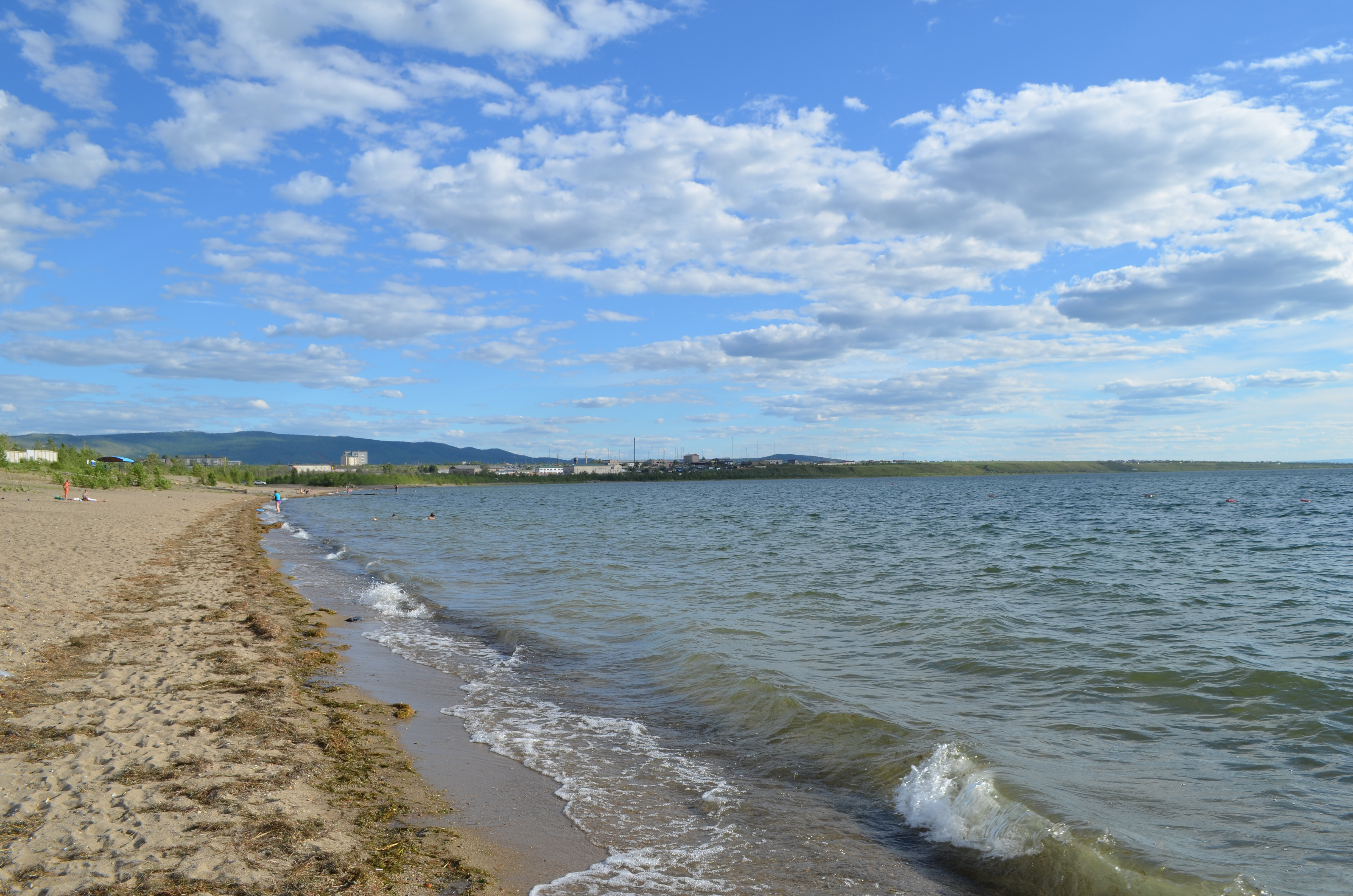 снимки конца июня - начала июля 2015 г.